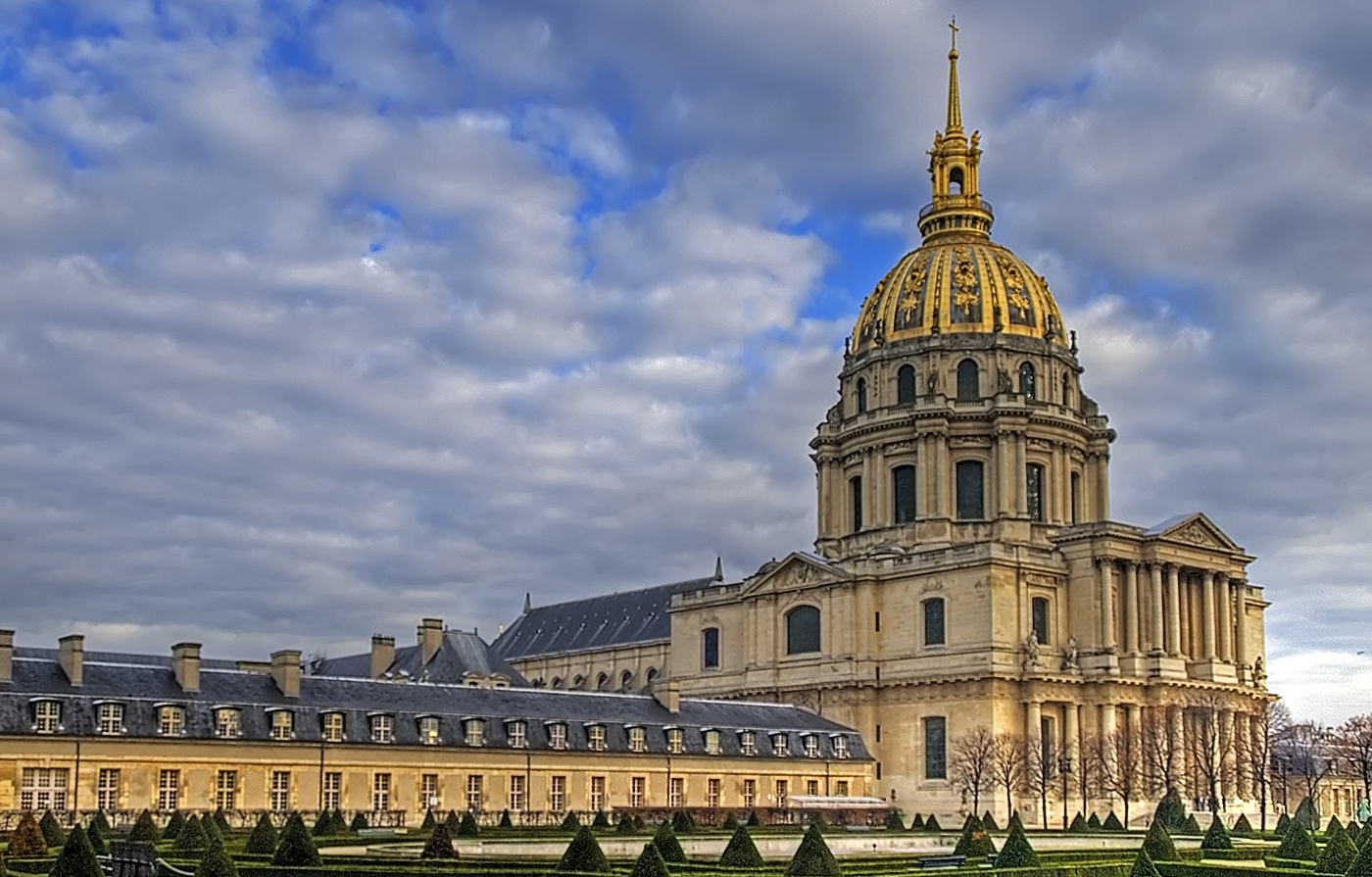 Les Invalides, Paris, France.